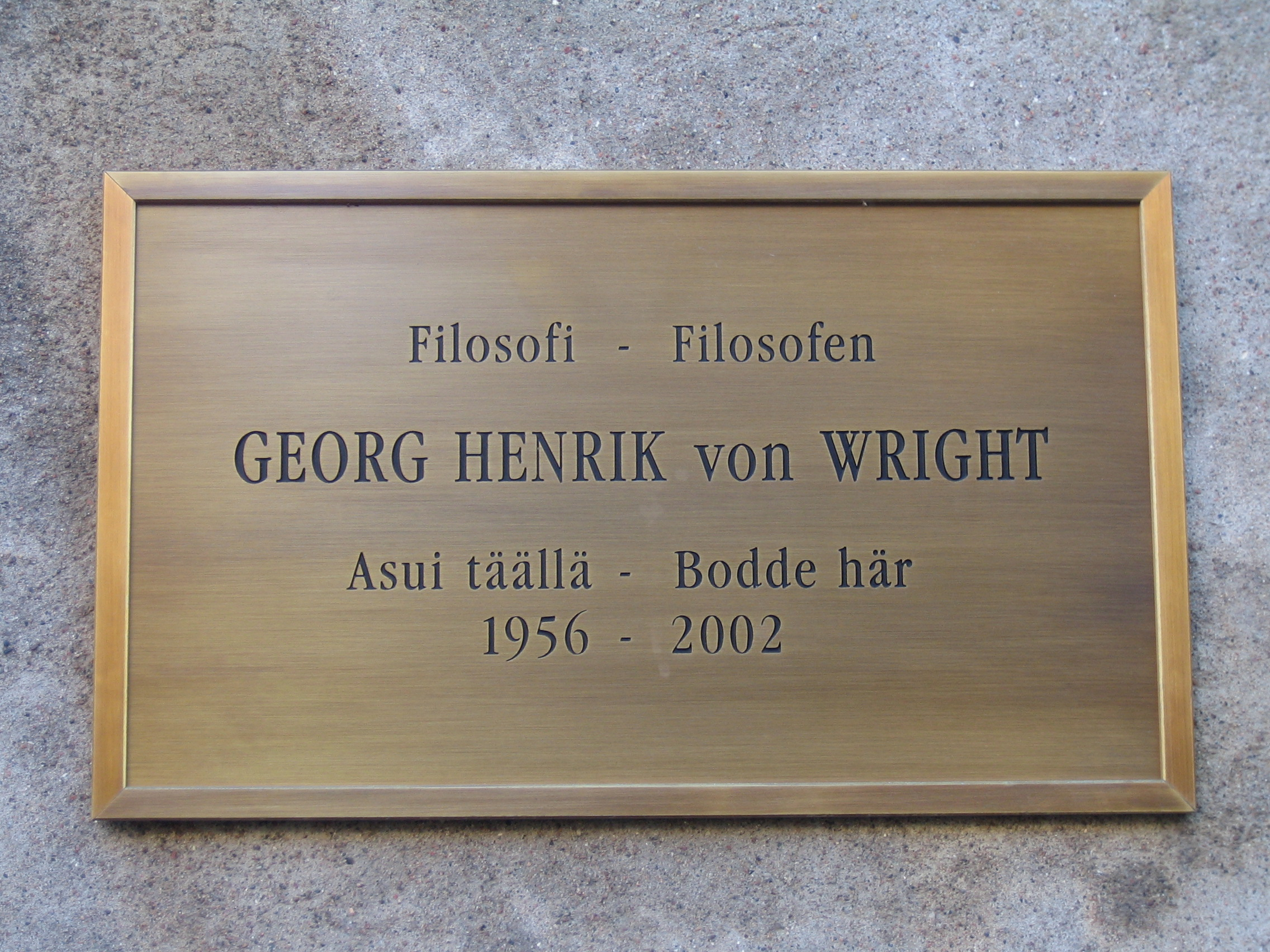 Georg Henrik von Wright's home, memorial plate; Eira, Helsinki, Finland.